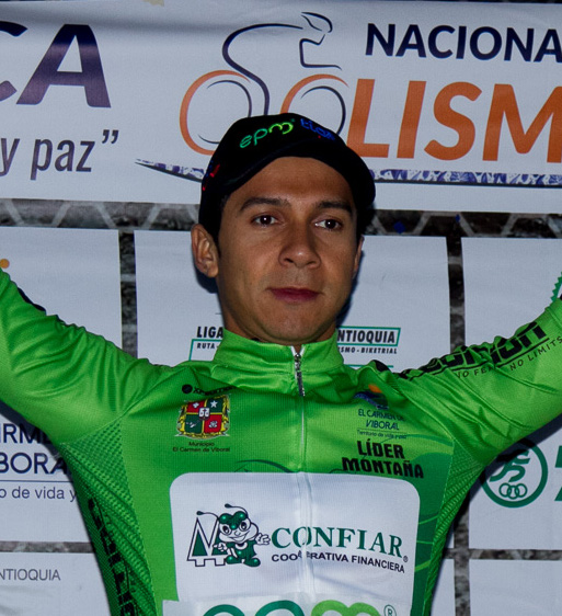 Et.1 Clásica El Carmen de Viboral. Róbigzon Oyola en el podio.